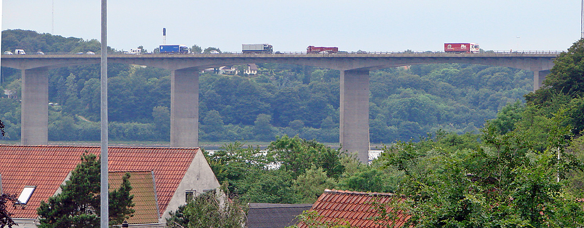 Vejlefjordbroen' set mod vest fra Bredballe på den nordlige side af fjorden